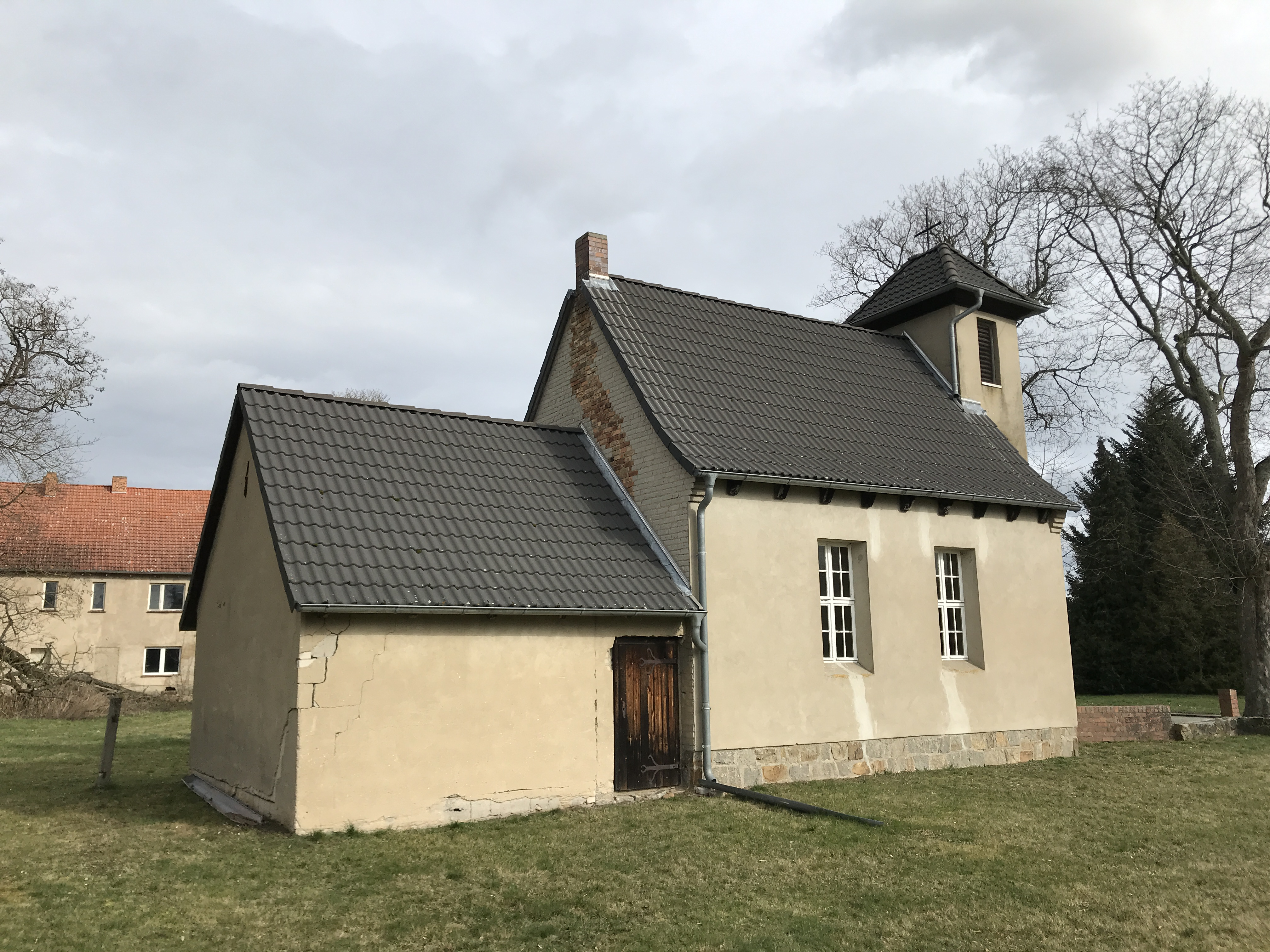 Die Dorfkirche Nonnendorf ist eine schlichte Saalkirche aus dem Jahr 1954 in der Gemeinde Niederer Fläming in Brandenburg.